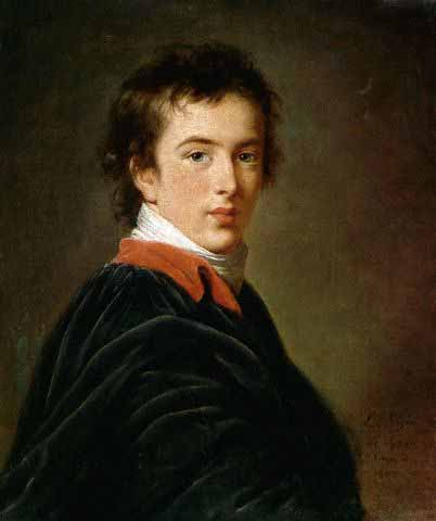 Согласно традиционной атрибуции: Гагарин Сергей Сергеевич (1795-1852), обер-гофмейстер.В каталоге Русского музея (1998): "Портрет неизвестного из семьи Гагариных" (Portrait of an Unknown Member of the Prince Gagarin Family)